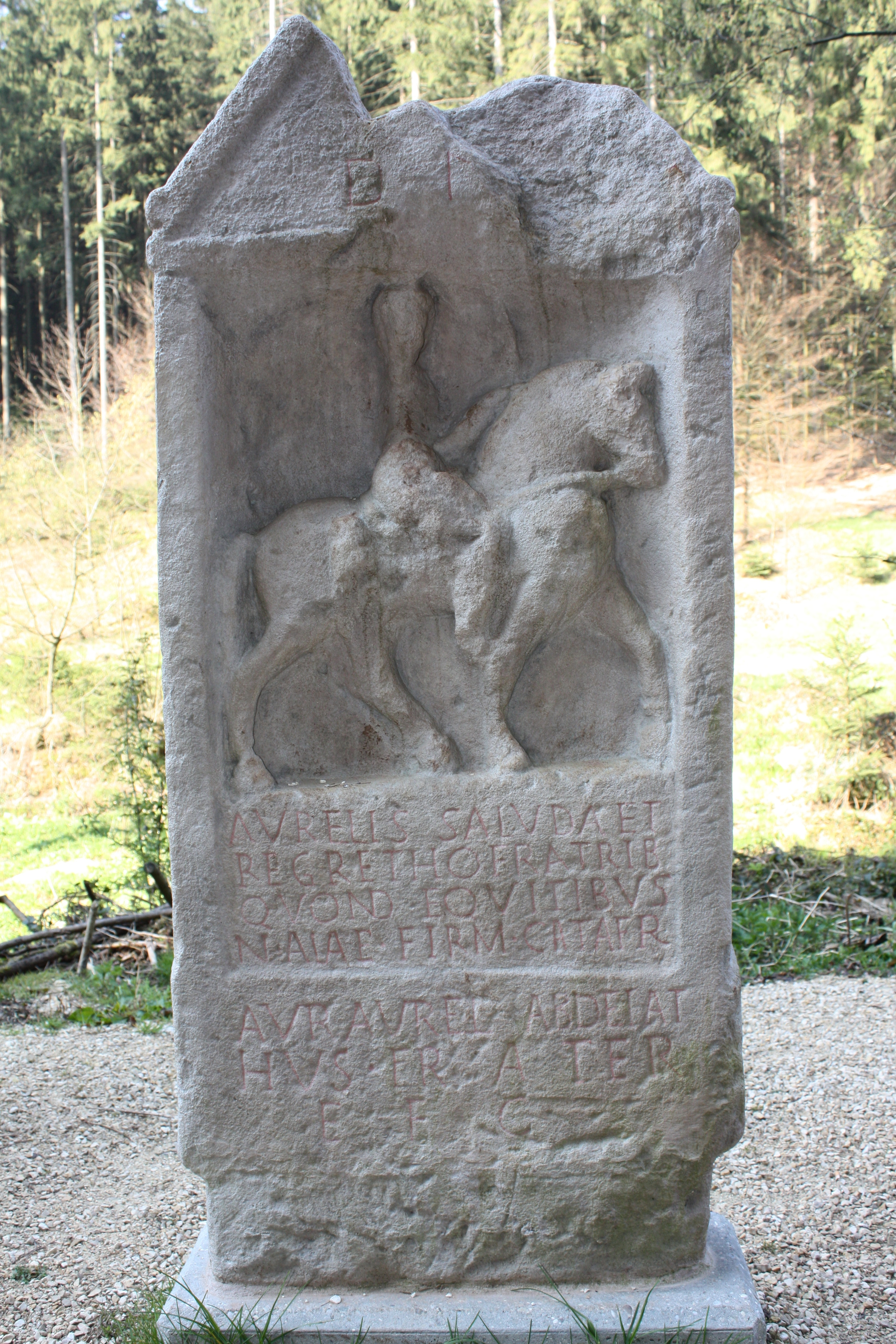 Grabstein zweier römischer Panzerreiter (Kataphrakten), Aurelius Saluda und Aurelius Regrethus, im Rotenbachtal (Schwäbisch Gmünd), datiert auf 3. Jh. n. Chr., Kopie eines Originals aus dem Landesmuseum Württemberg. Fundort des Originals ein Gräberfeld in Stuttgart-Bad Cannstatt (1930). Die beiden Brüder dienten in der Ala nova firma catafractaria, ca. 234-235 n.Chr. Der Grabstein wurde vonb ihrem Bruder Aurelius Abdedathus gestiftet. Die Einheit wurde in den östlichen Provinzen aufgestellt und unter den Kaisern Severus Alexander und Maximinus Thrax von 222-235 an der Nordgrenze eingesetzt.